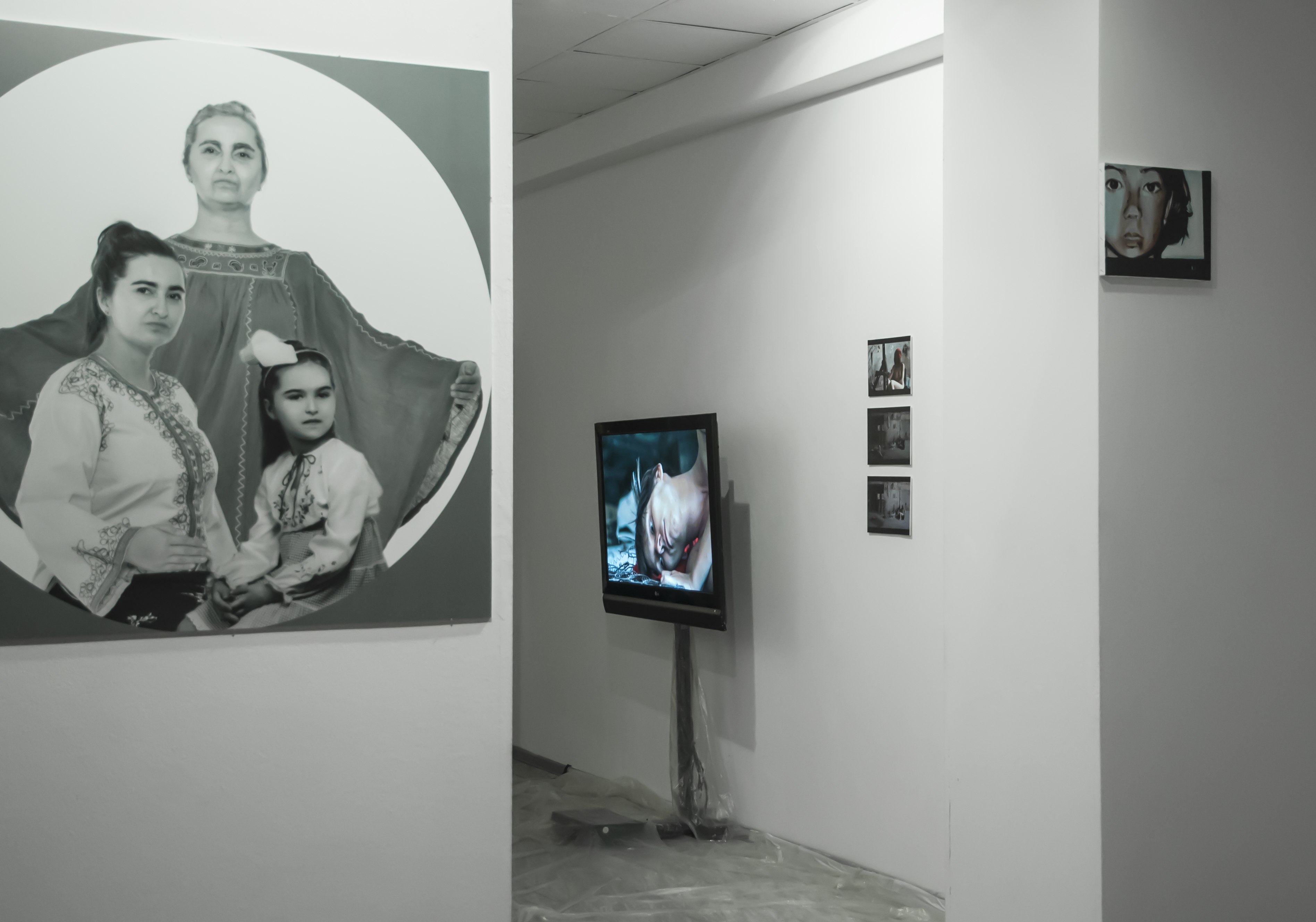 Wystawa grupy Frakcja w galerii Manhattan Transfer w Łodzi, 2017.